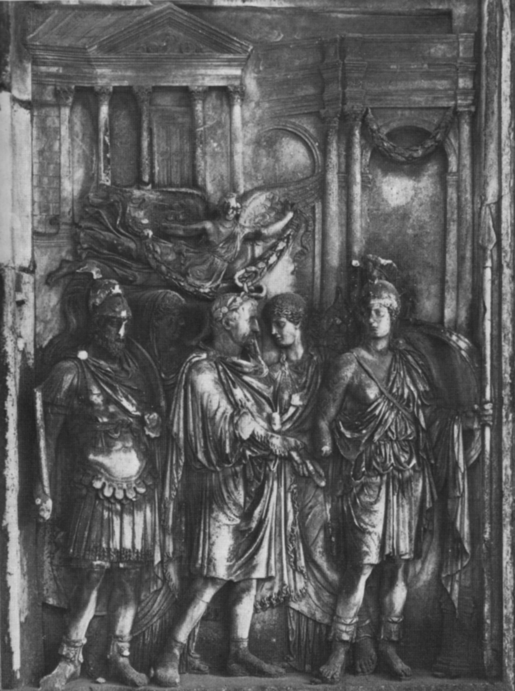 Relevo do advento de Aureliano no Arco de Constantino